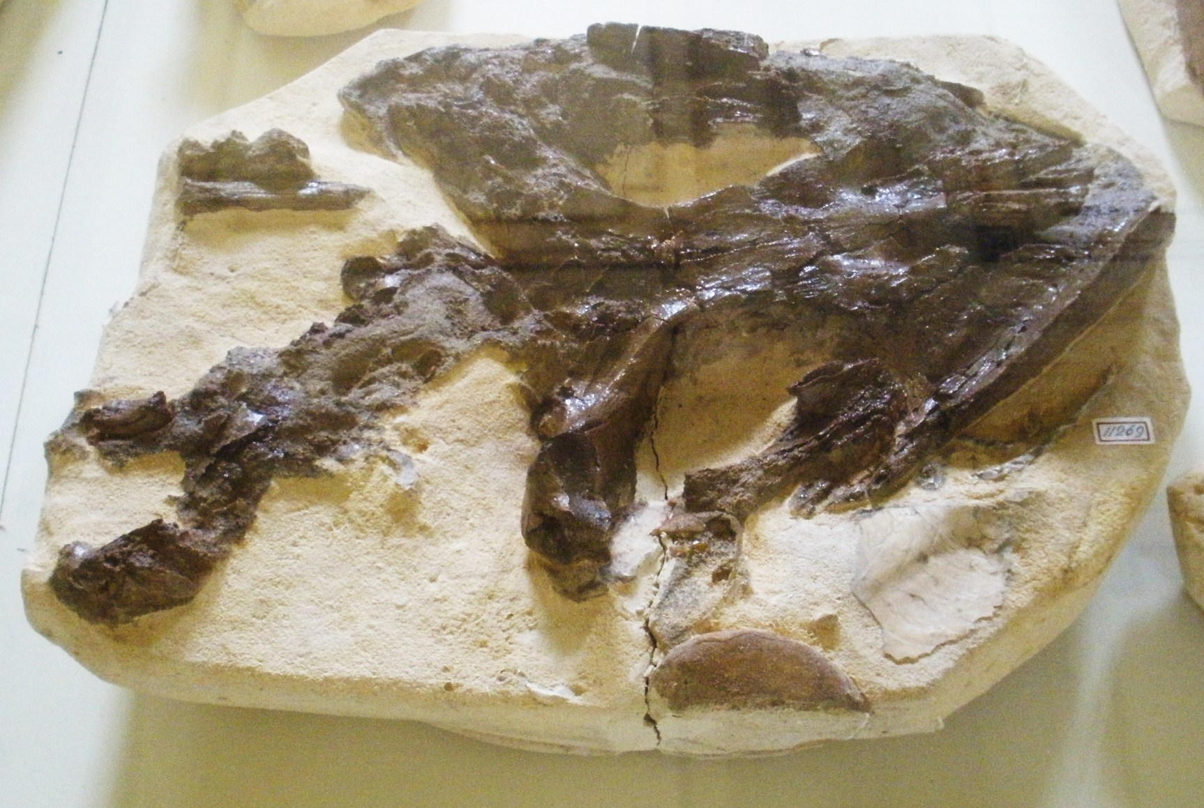 Fossil of Allopleuron, an extinct turtle- Took the photo at Teylers Museum, Haarlem